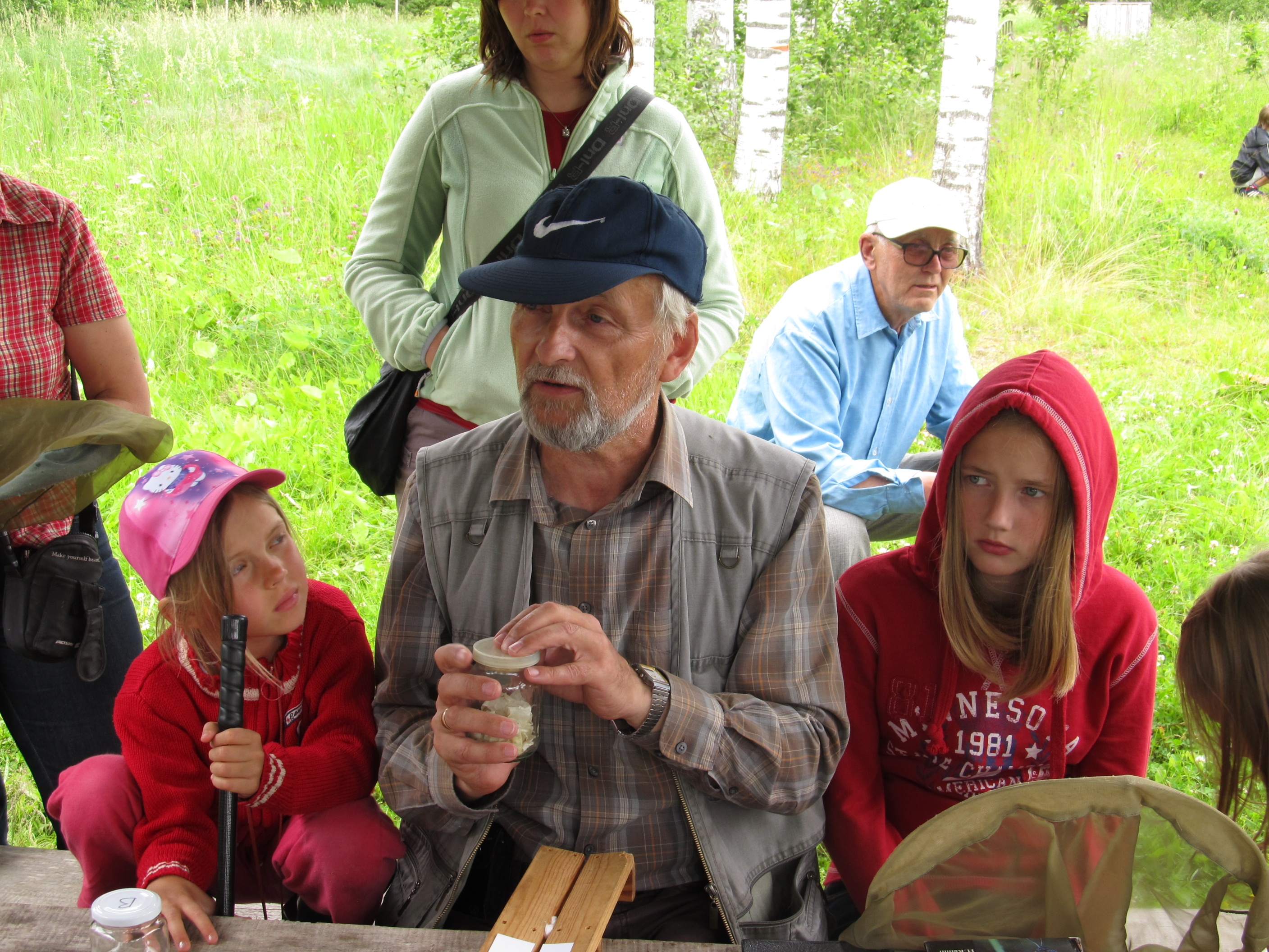 Mati Martin õpetab putukate nõelastamist TÜ Loodusmuuseumi korraldatud huvipäeval Ilmatsalus 30. juunil 2012.